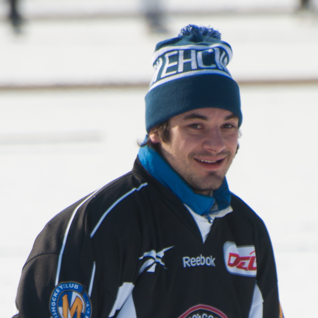 Dieses Bild zeigt den deutschen Eishockeytorwart Jochen Reimer beim Pondhockey